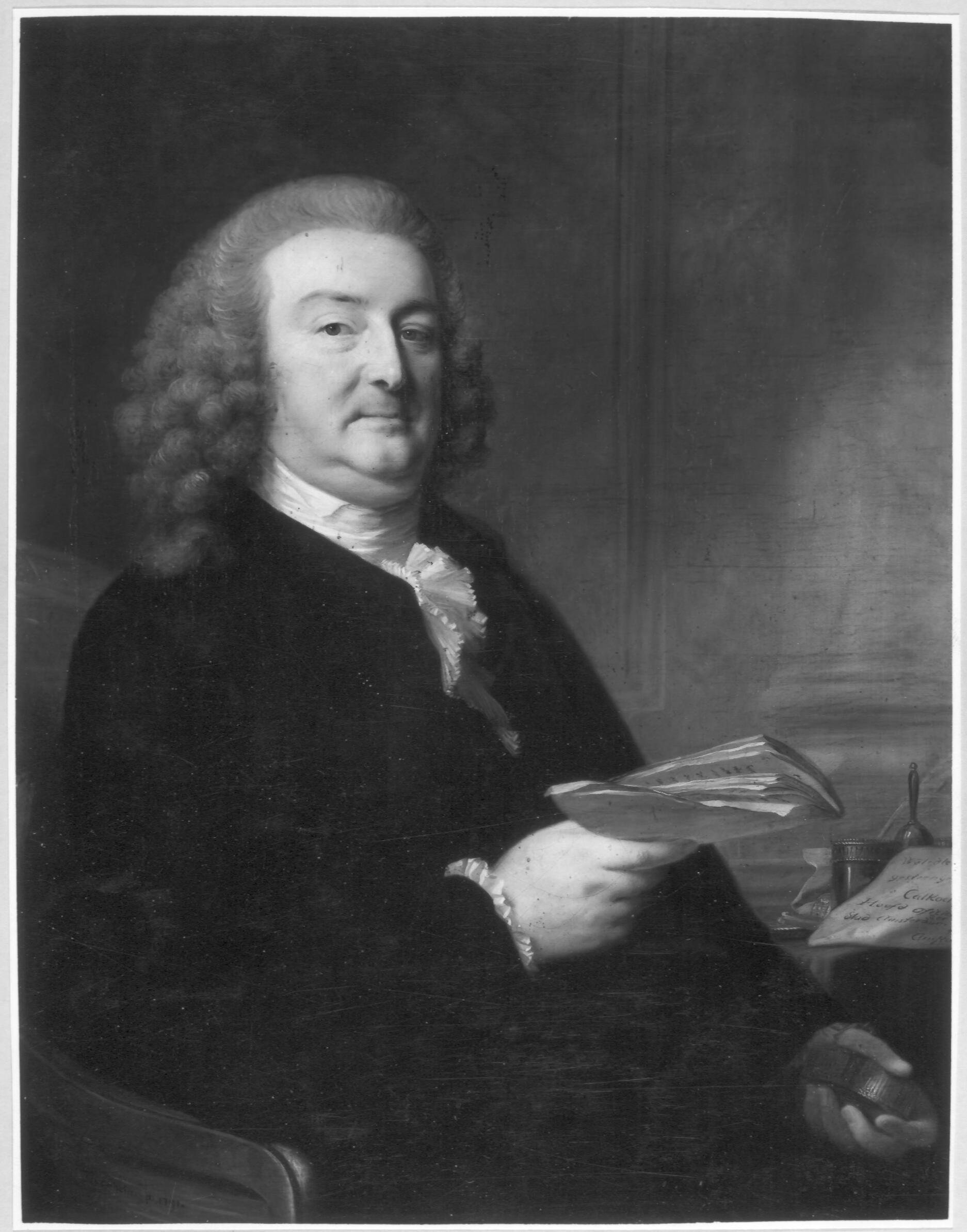 Portret van de Amsterdamse regent Abraham Calkoen (1729-1796)